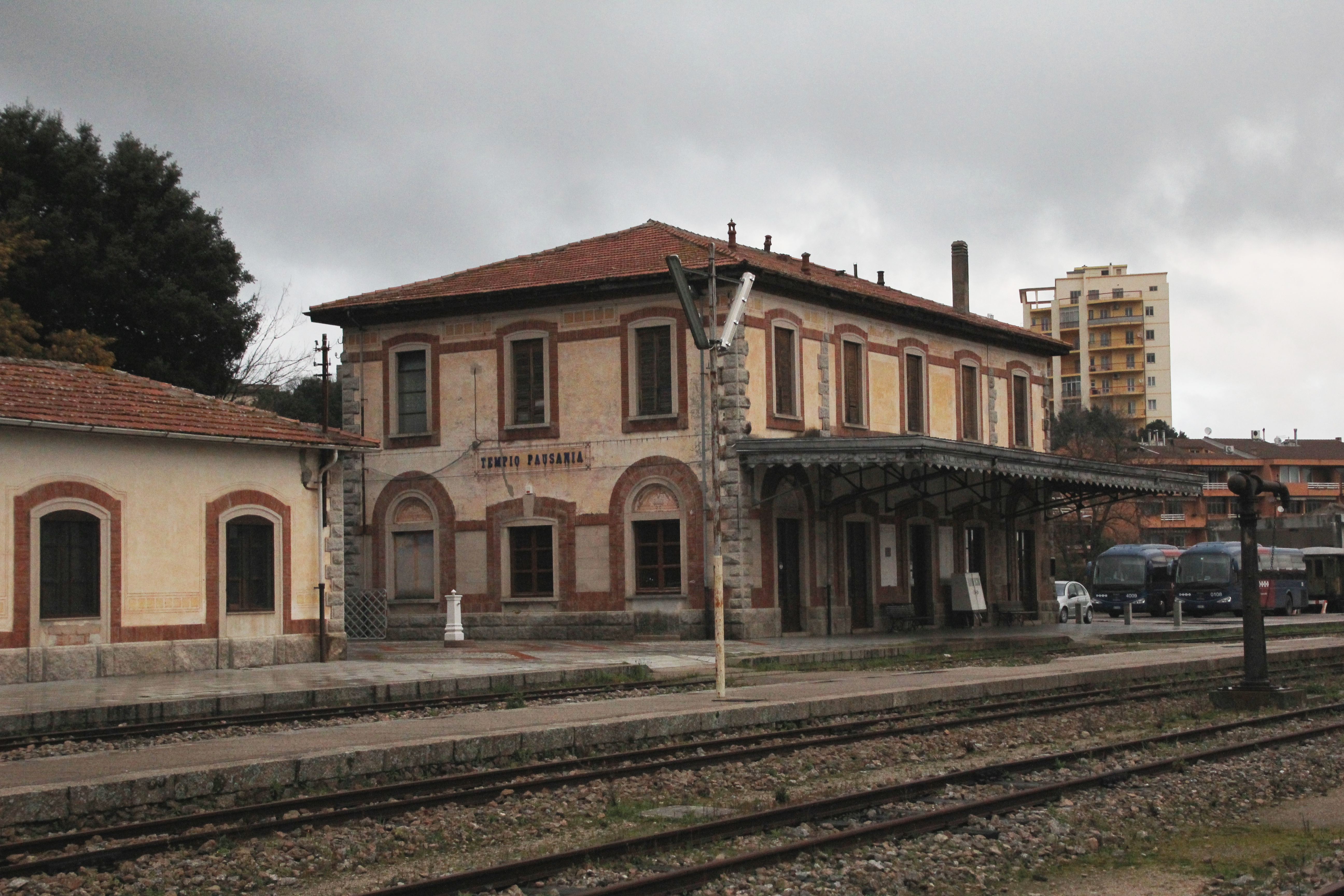 Tempio Pausania - Stazione ferroviaria